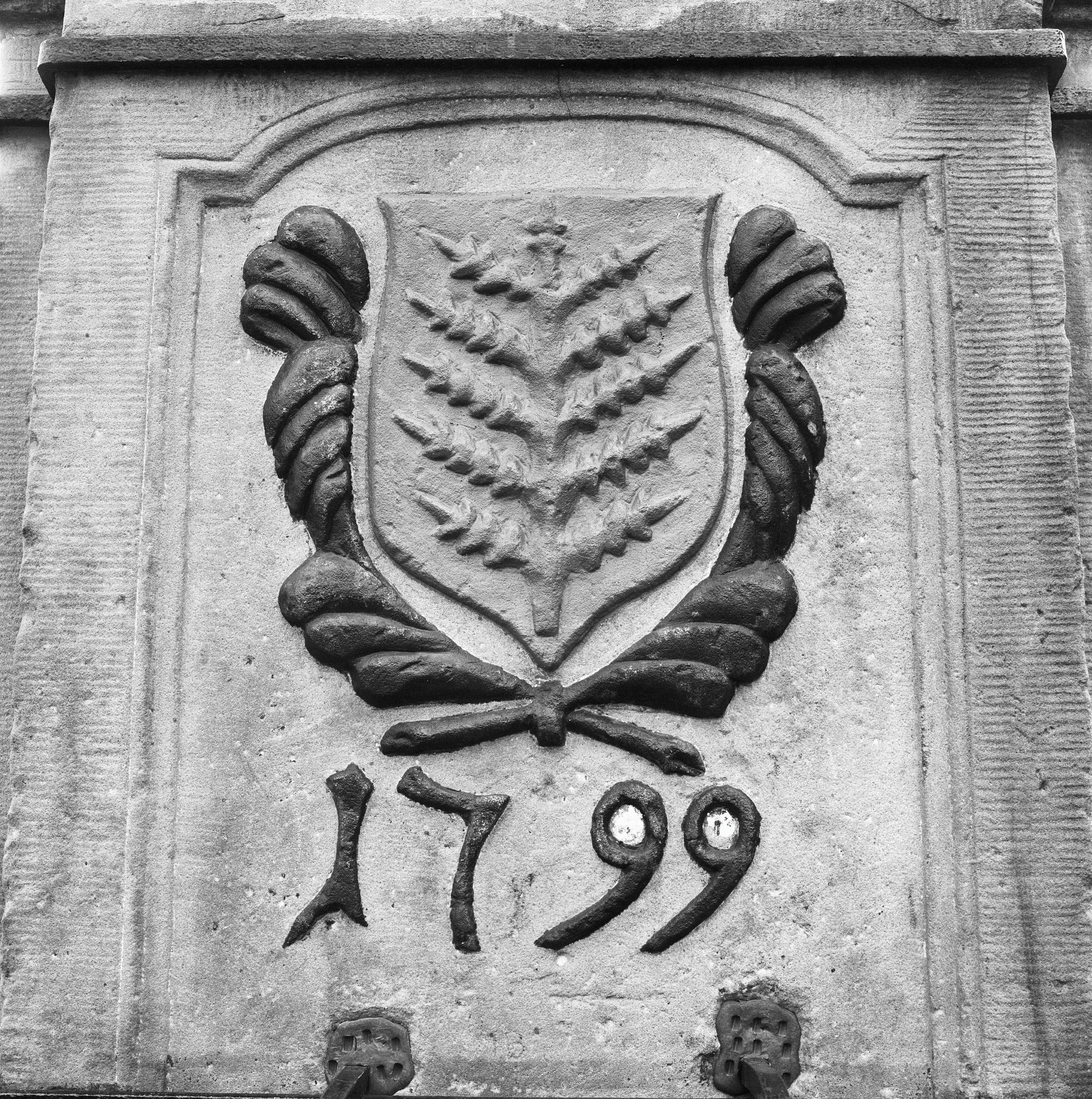 ZANDSTENEN POMP: Exterieur DETAIL VAN HET WAPEN MET JAARTAL